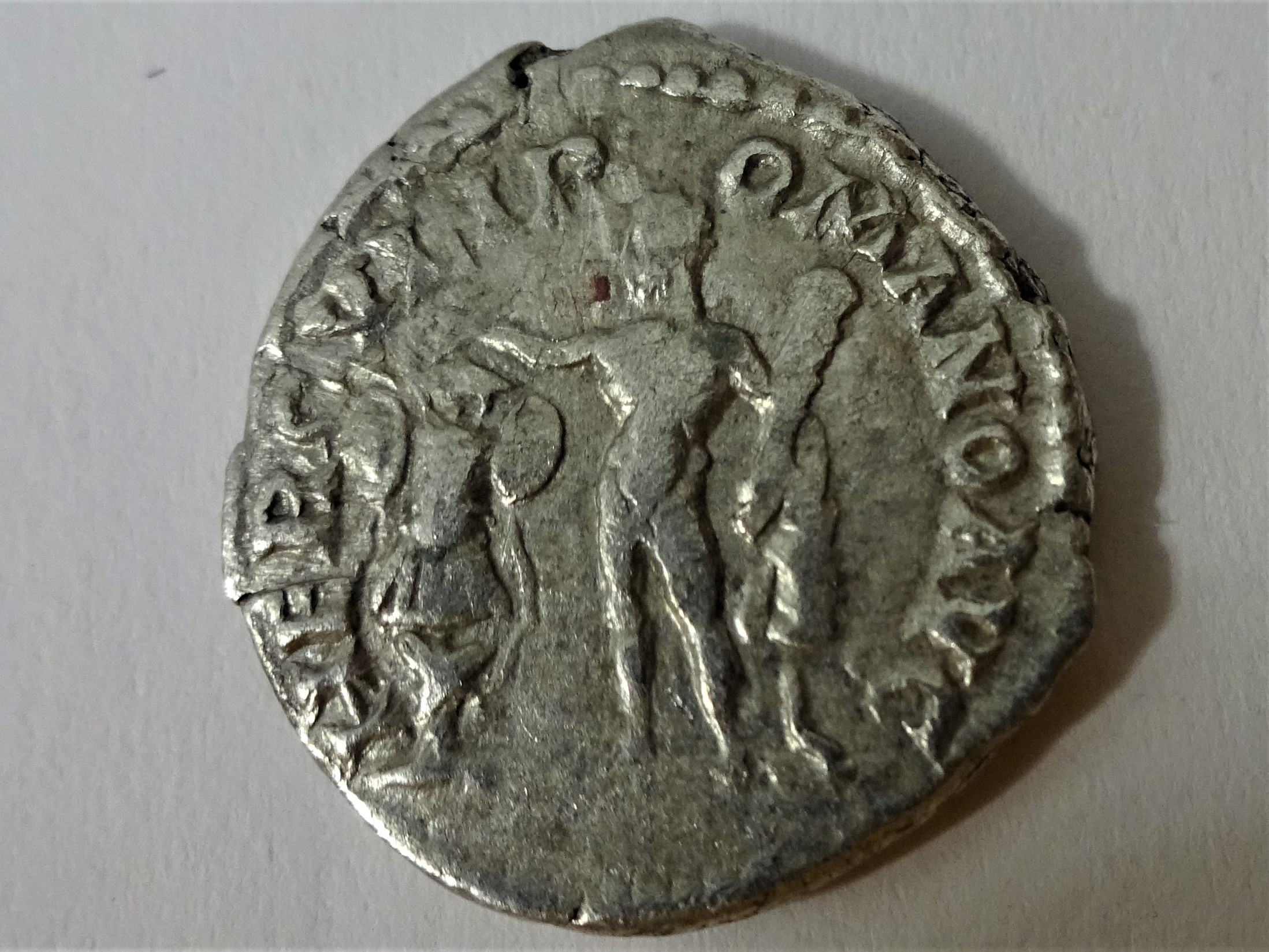 Commodus als Hercules auf Rückseite einer seiner Denare mit Umschrift HERCVLI ROMANO AVG, Kampmann 41.91